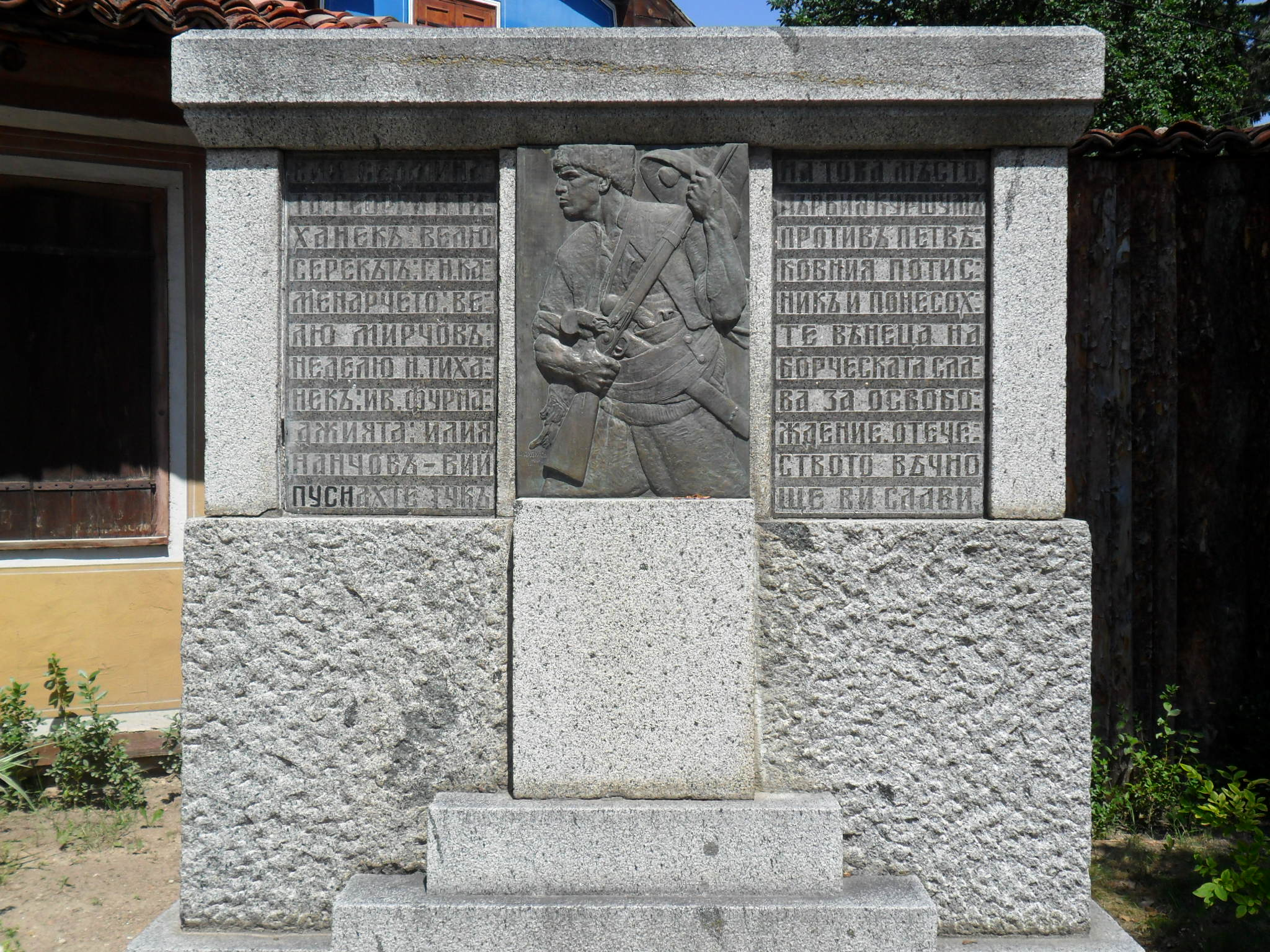 Паметник до Калъчевия мост, където е изстрелян първия куршум по време на Априлското въстание